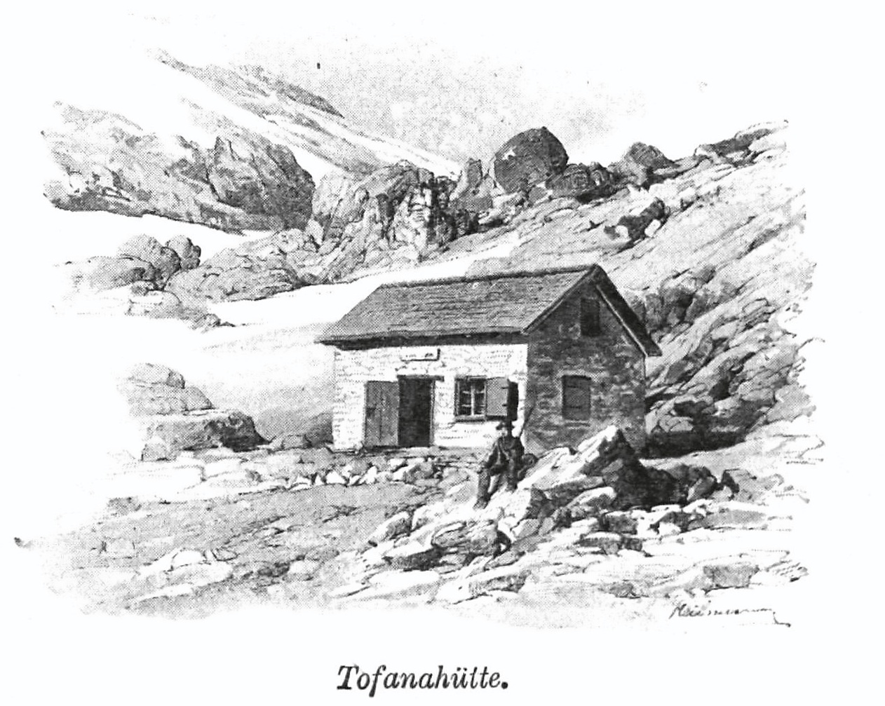 Tofanahütte aus Zeitschrift des Deutschen und Oesterreichischen Alpenvereins 1894 Band 25 (im 1. Weltkrieg zerstört heute Camillo Giussiani Hütte)